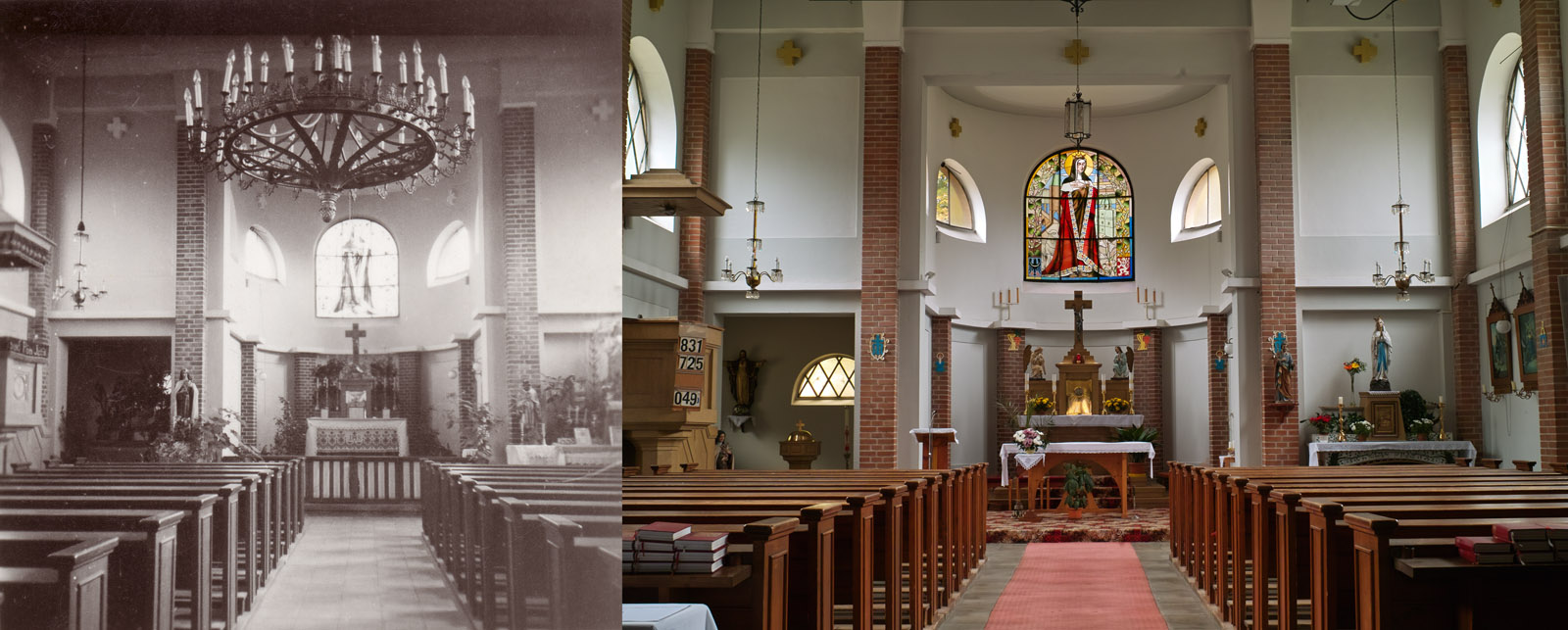 Kostel svaté Anežky České (České Velenice), srovnání interiéru 10. října 1958 a 2. října 2010